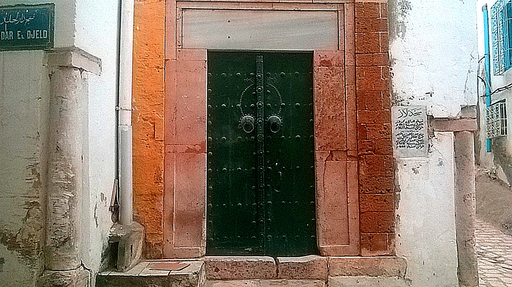 La médina de Tunis مدينة تونس العتيقة